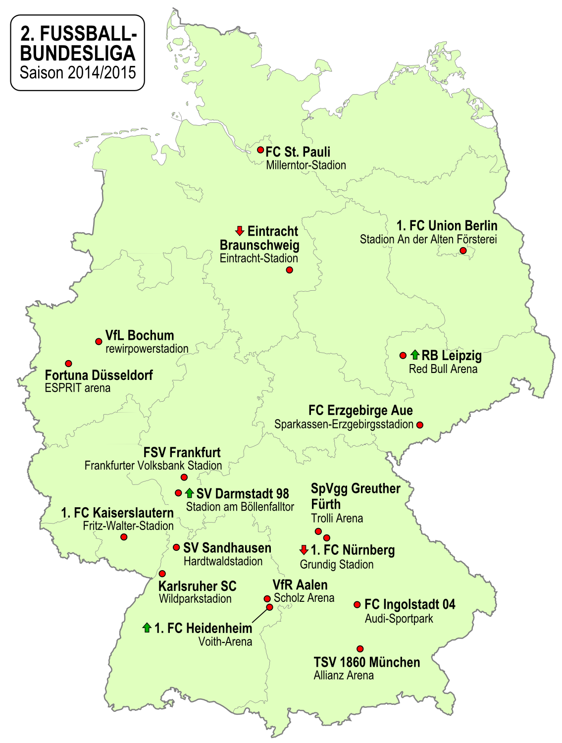 Karte der Vereine der 2. Fußball-Bundesliga-Saison 2014/2015